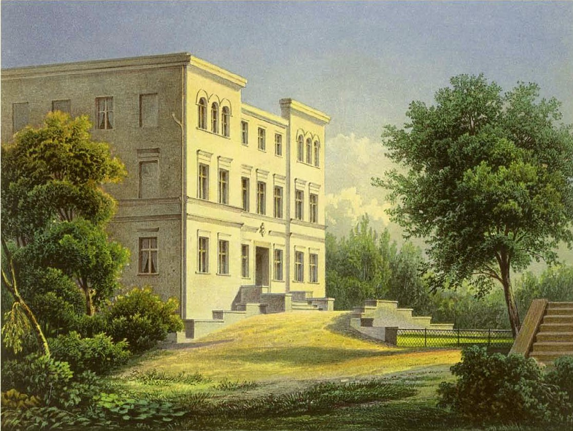 Rittergut Zieckau, Lithografie aus dem 19. Jahrhundert